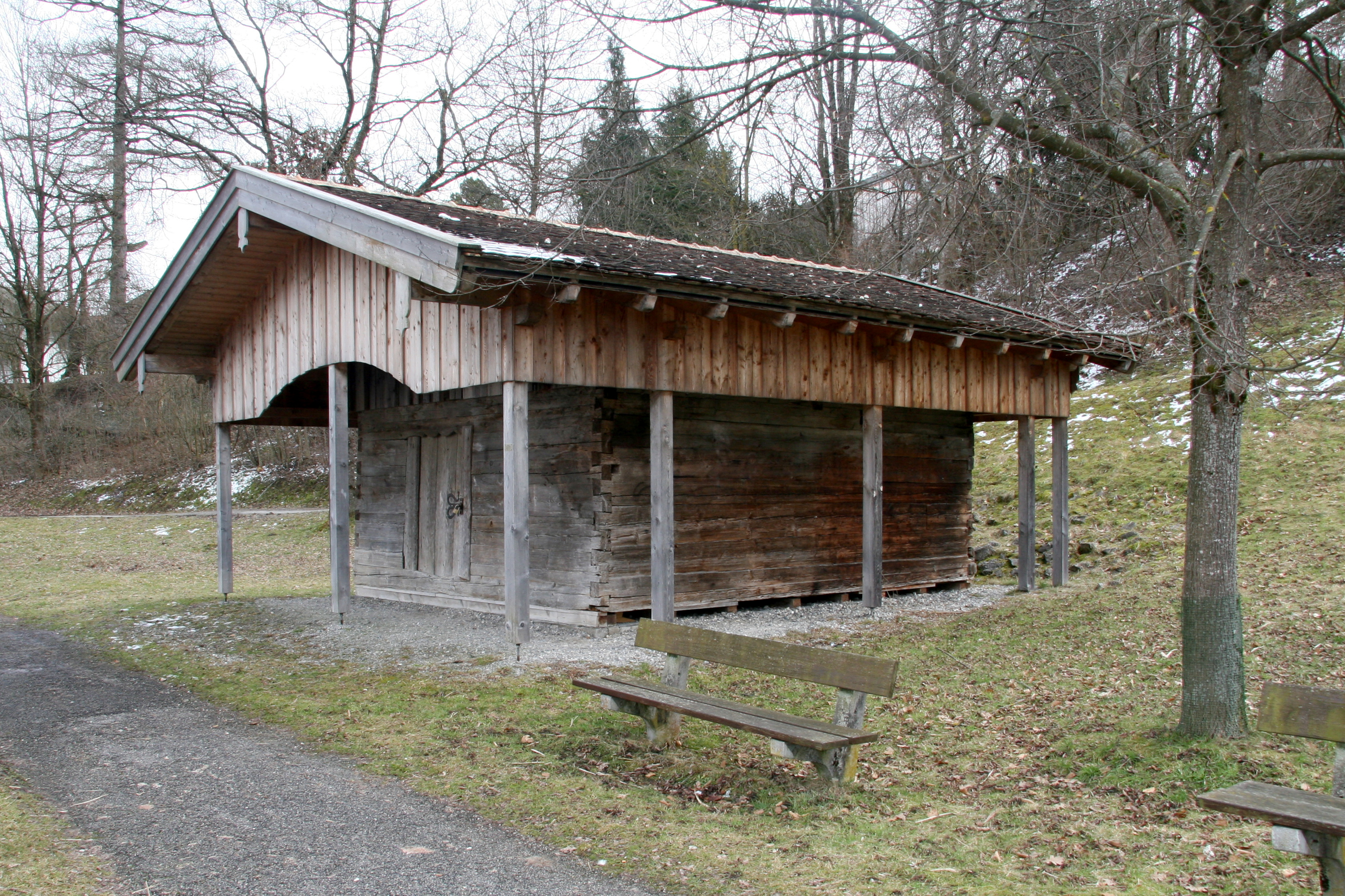 Ehemaliger Getreidekasten, erdgeschossig mit neuem Überbau, Mitte 17. Jahrhundert, neu aufgestellt. This is a photograph of an architectural monument.